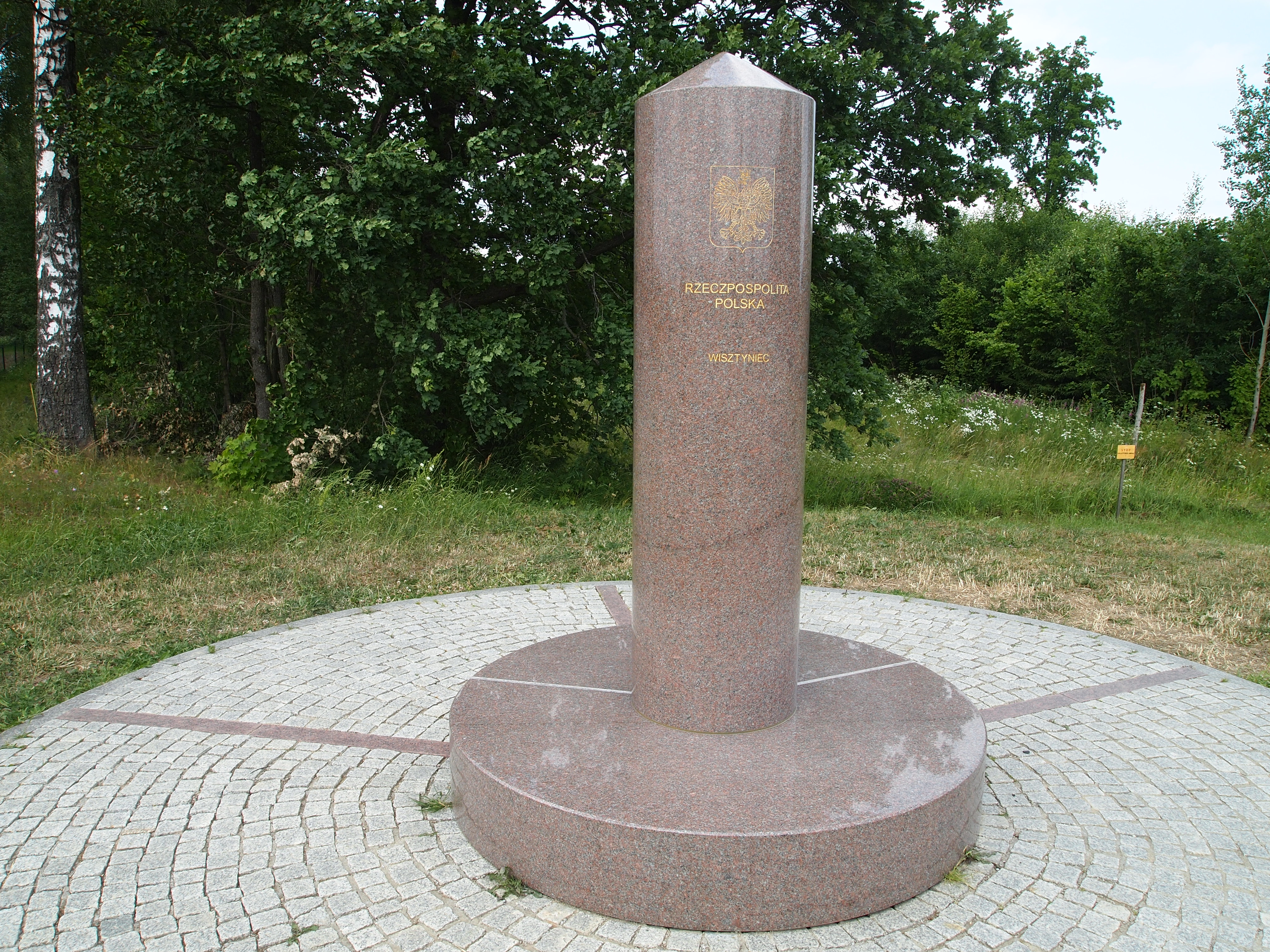 Wiżajny - Bolcie. PL. RUS. LIT.